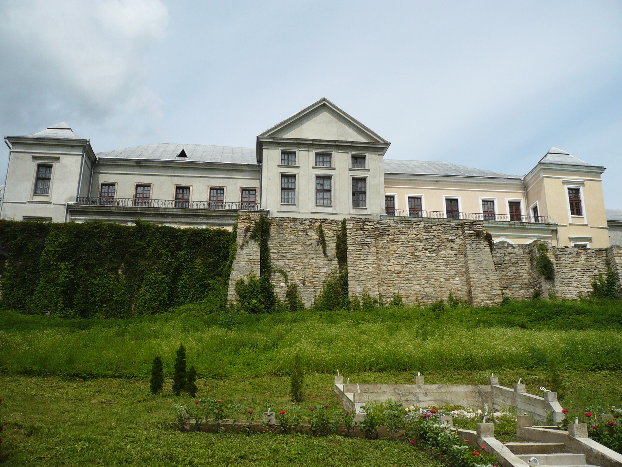 Wiśniowiec, pałac